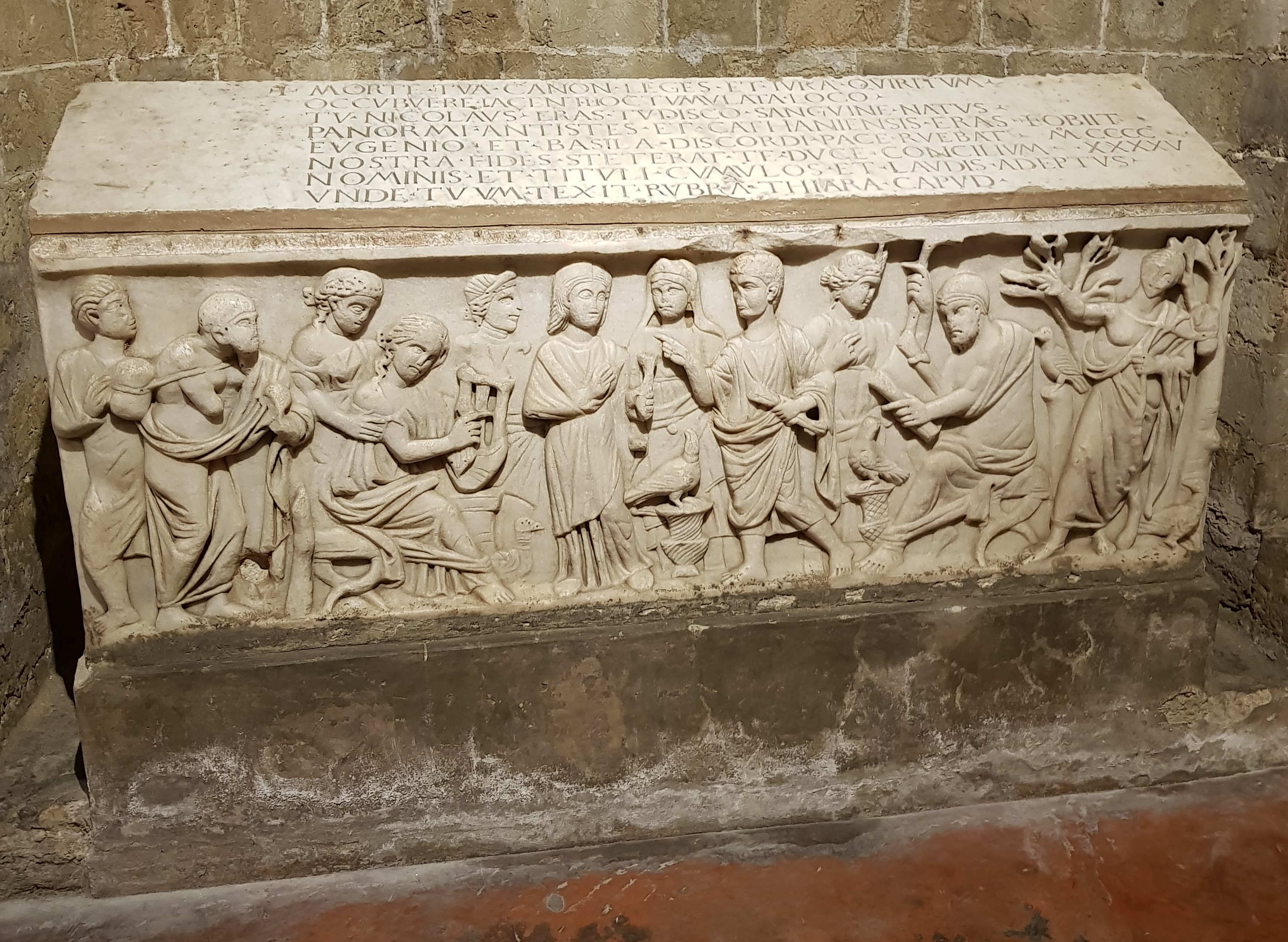 Sarkophag des Erzbischofs (Nicolaus de Tudeschis, genannt Panormitanus)